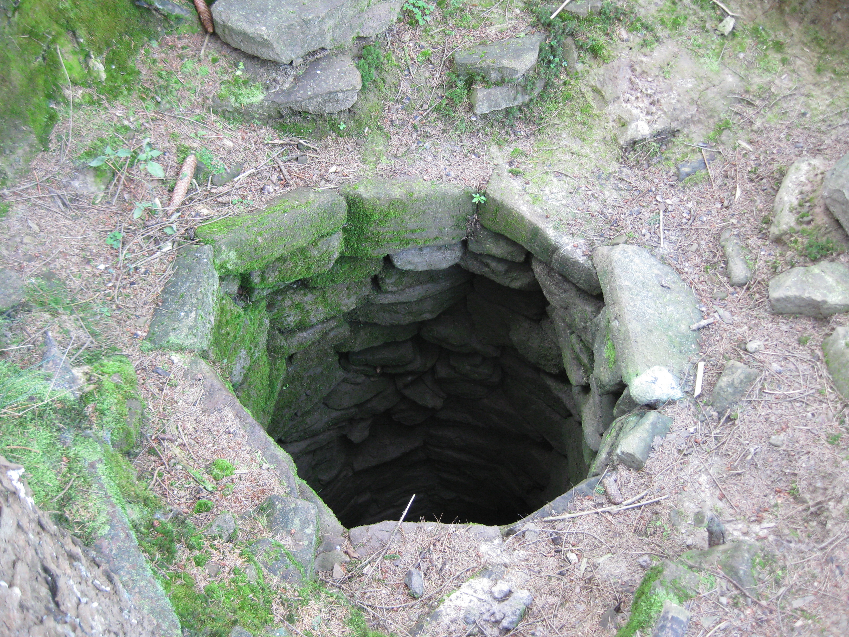 Brunnen im Bereich der Wüstung Winnefeld im Solling.